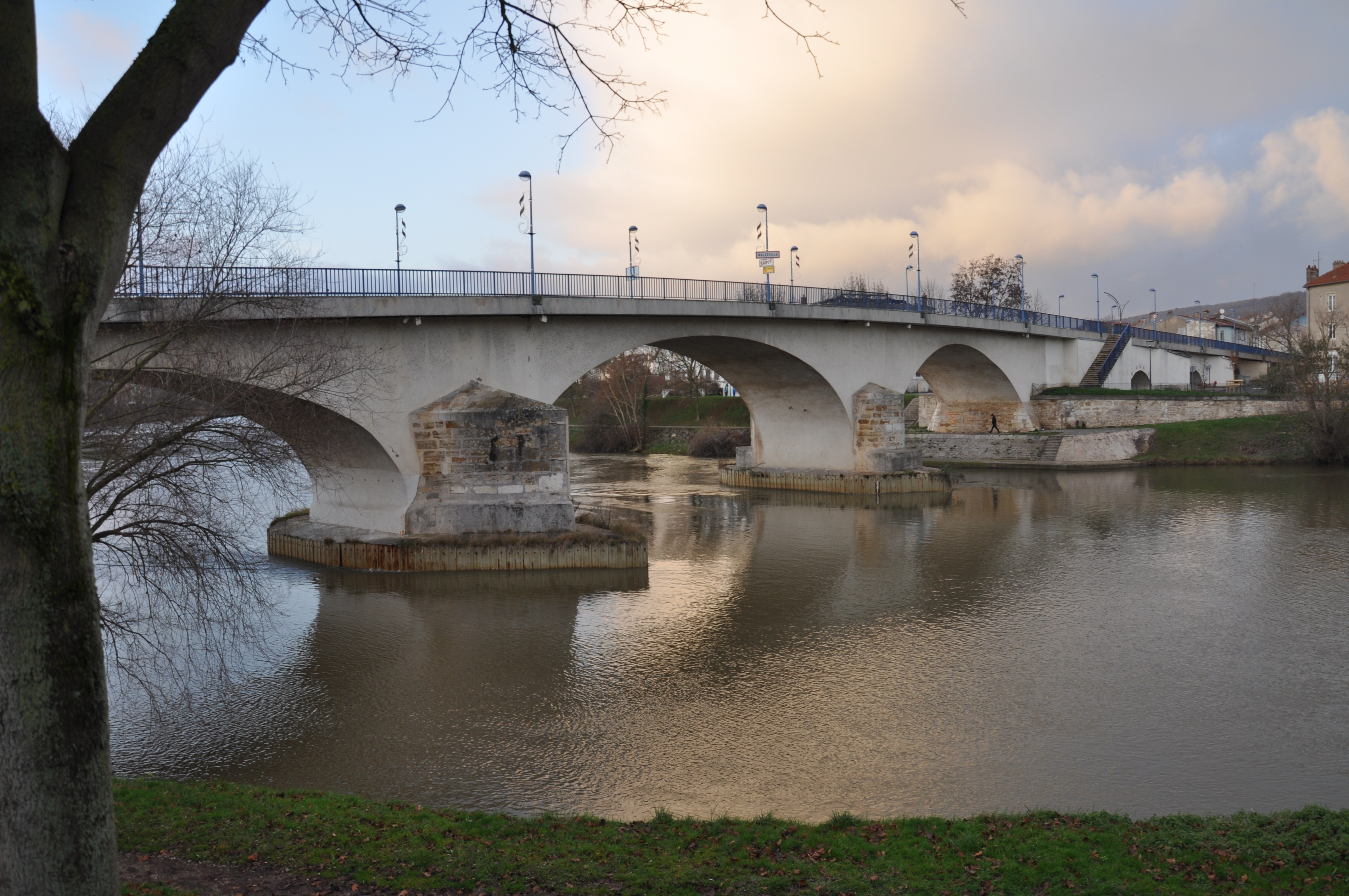 Vue du pont de Malzéville sur la Meurthe, près de Nancy en Meurthe-et-Moselle